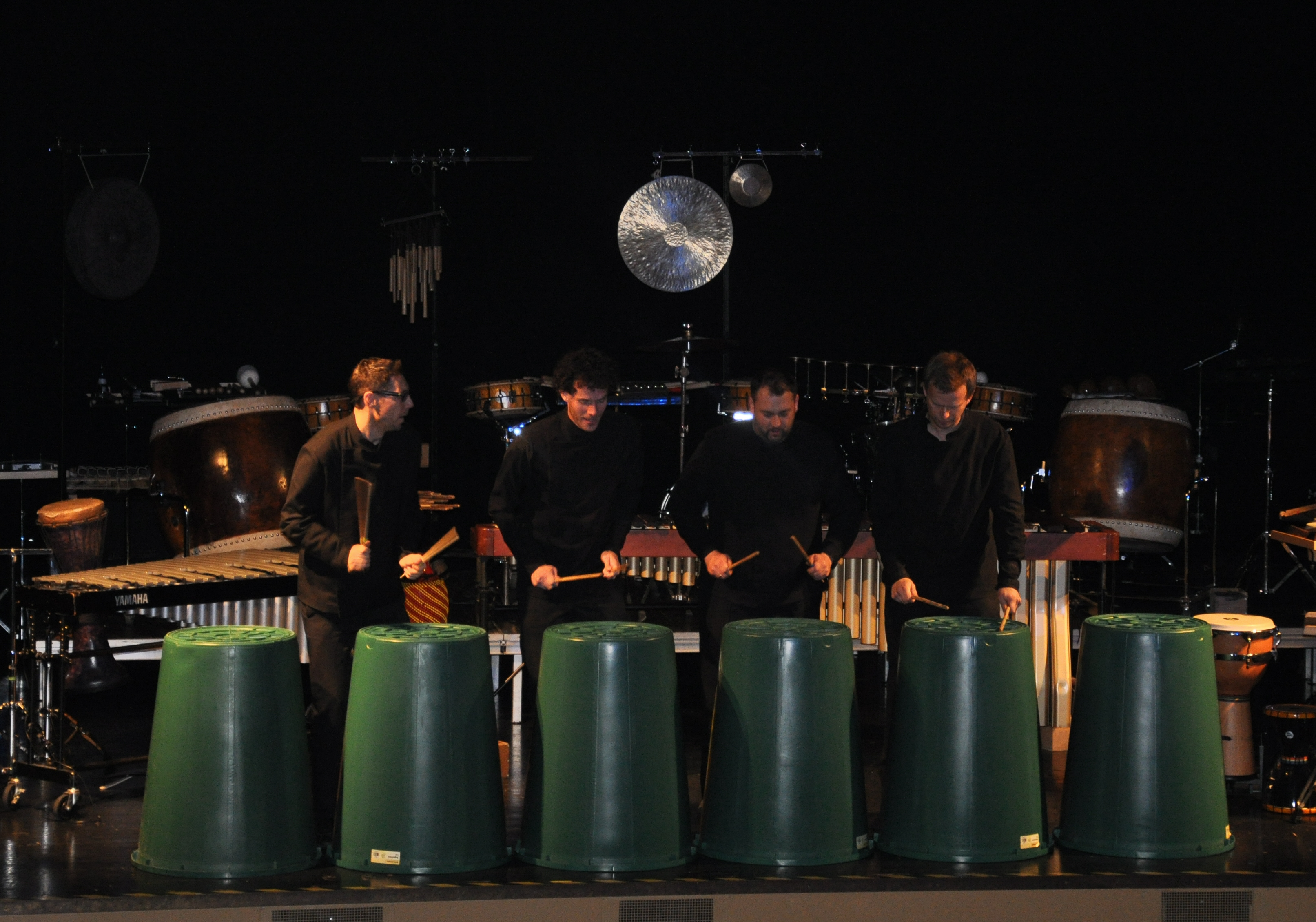 ElbtonalPercussion bei einem Familienkonzert am Tag der Offenen Tür im Konzerthaus Ravensburg